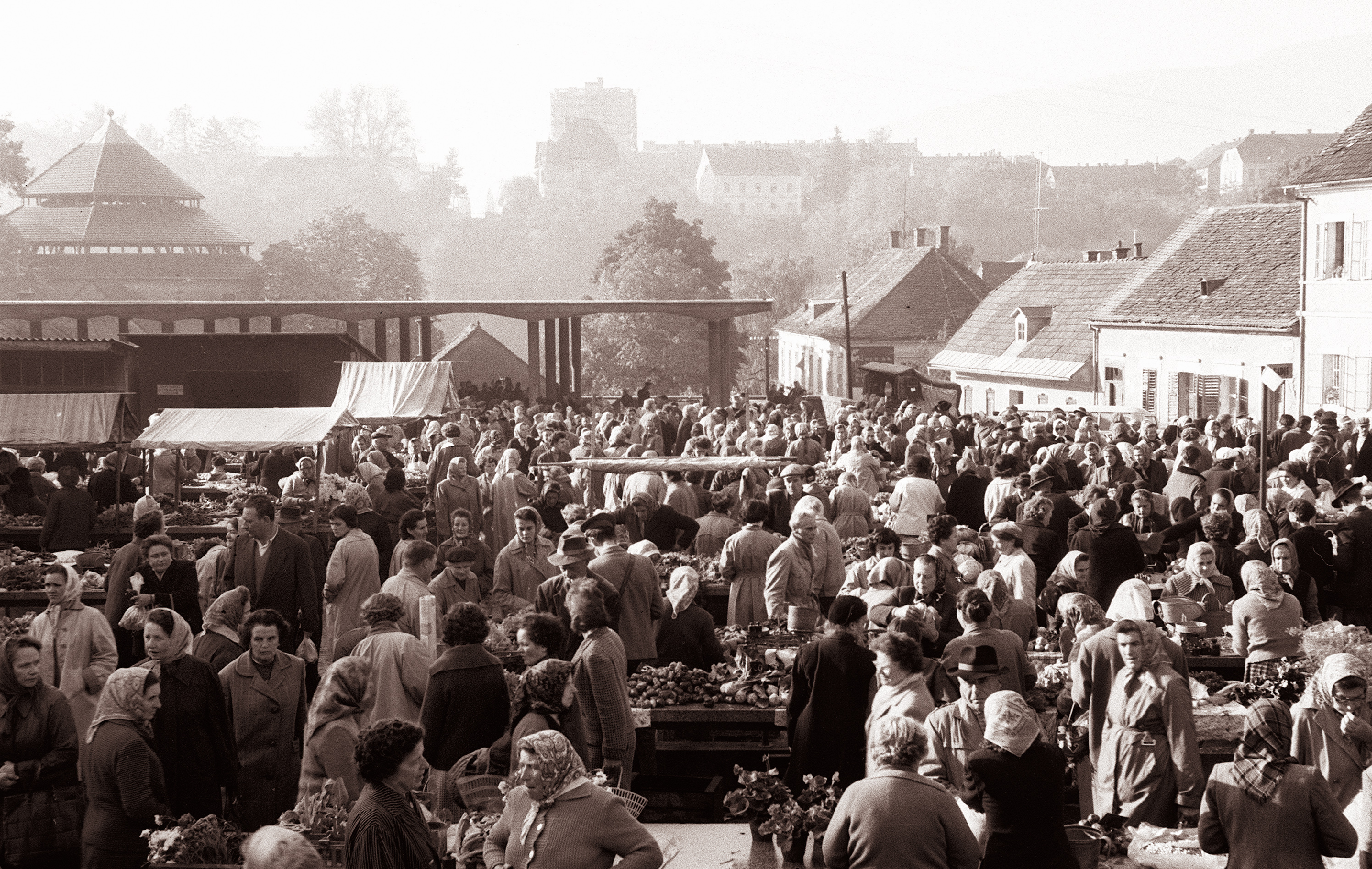 Mariborska tržnica.